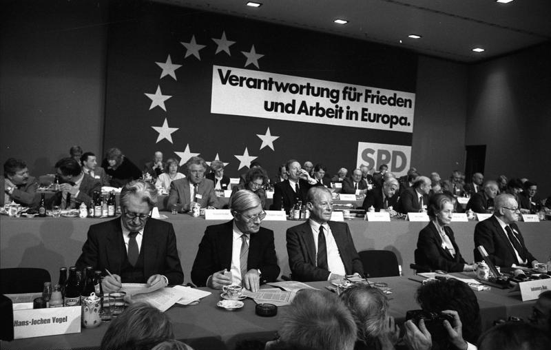 19.11.1983 SPD-Parteitag in Kölner Messezentrum Verabschiedung des Leitantrages des SPD-Vorstandes zur Sicherheitpolitik (zur Nachrüstung gemäß NATO-Doppelbeschluß).